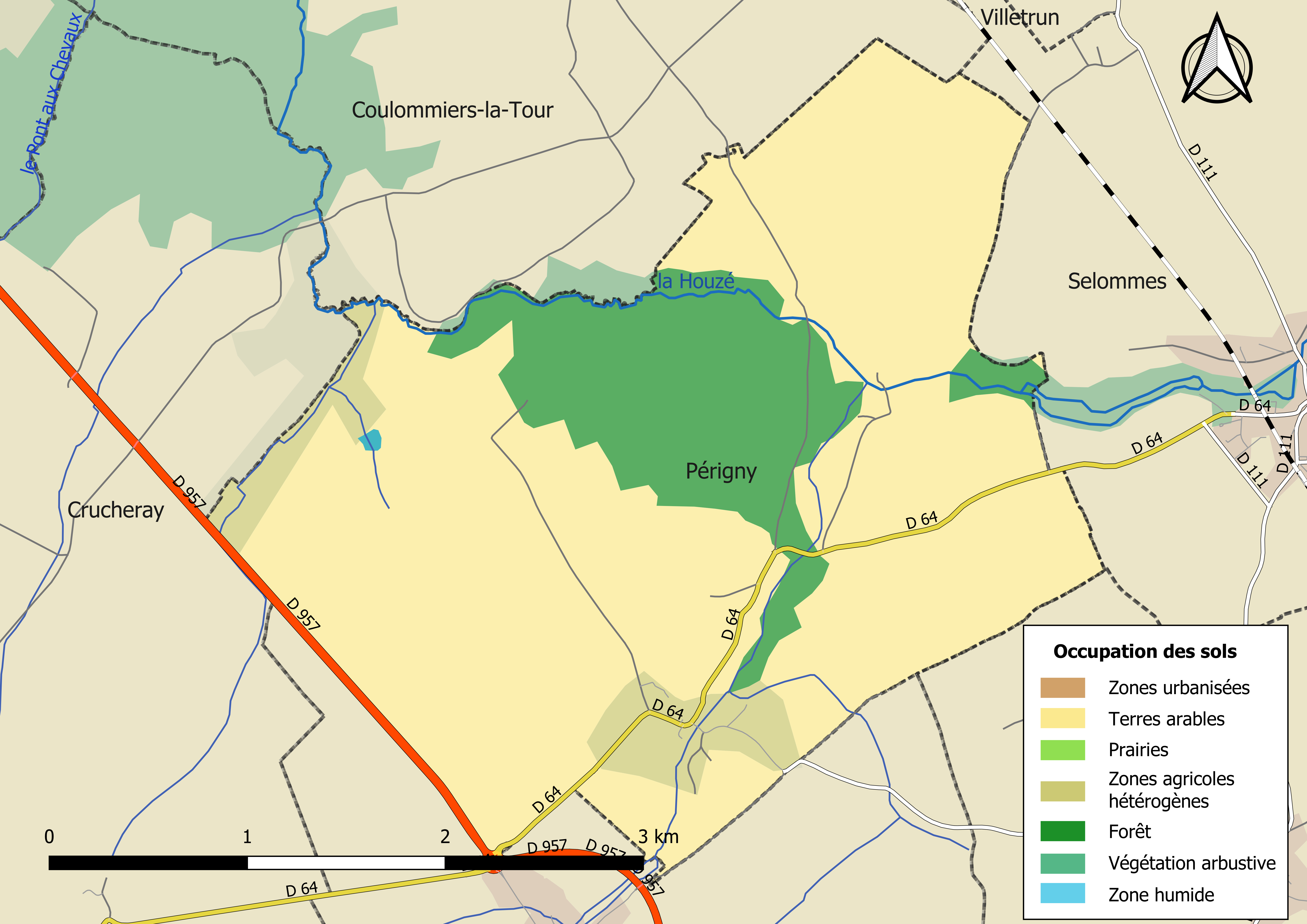 Carte des infrastructures et de l’occupation des sols en 2018 de la commune de Périgny (Loir-et-Cher) (France).